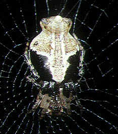 female Cyclosa confusa from Okinawa.